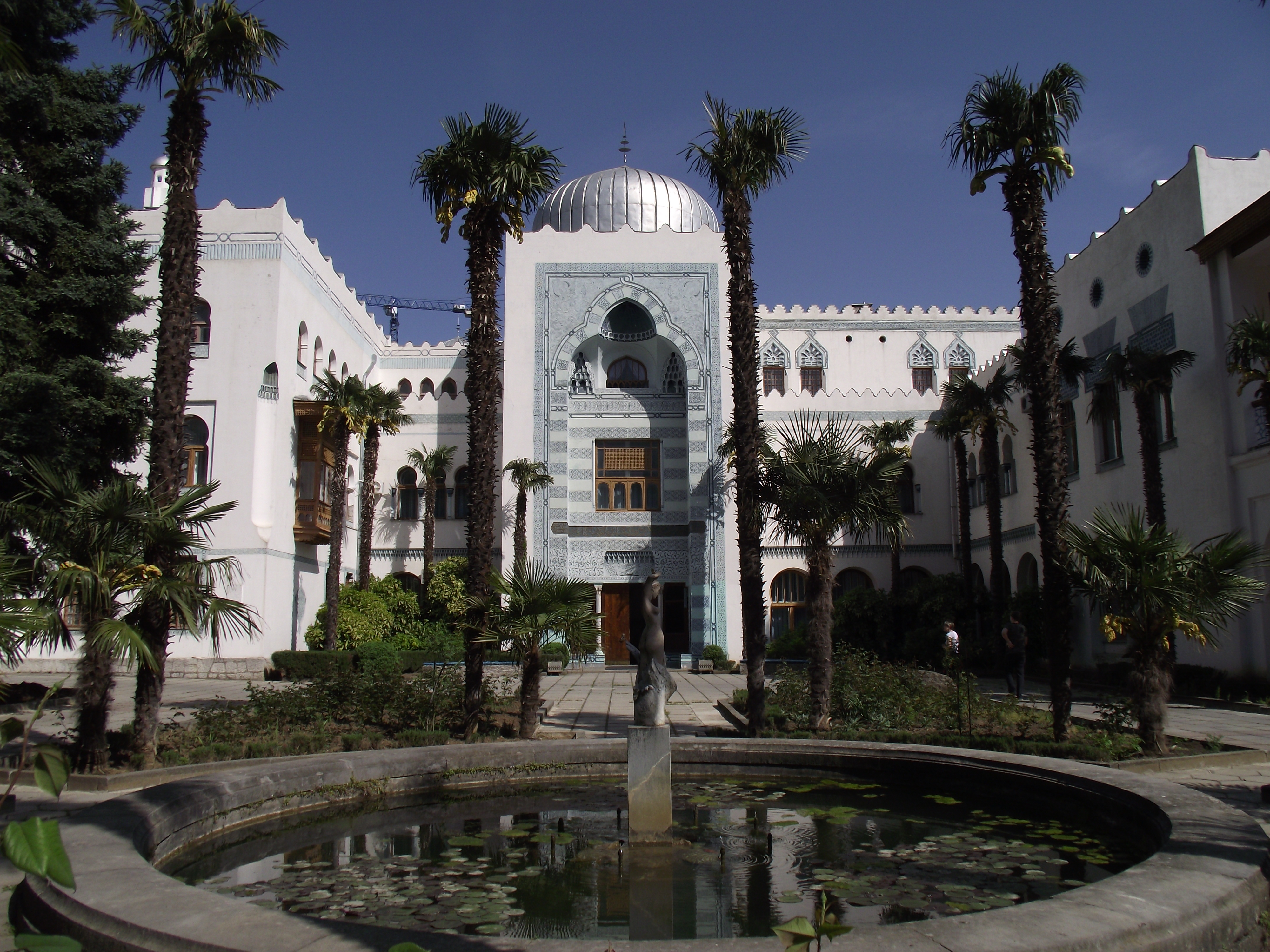 Дворец Дюльбер